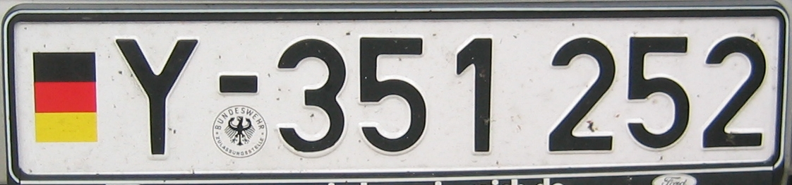 Deutsches Kfz-Kennzeichen für Bundeswehr / German registration plate for Bundeswehr (military)